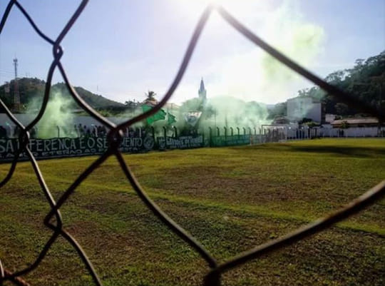 Floresta Cambuci